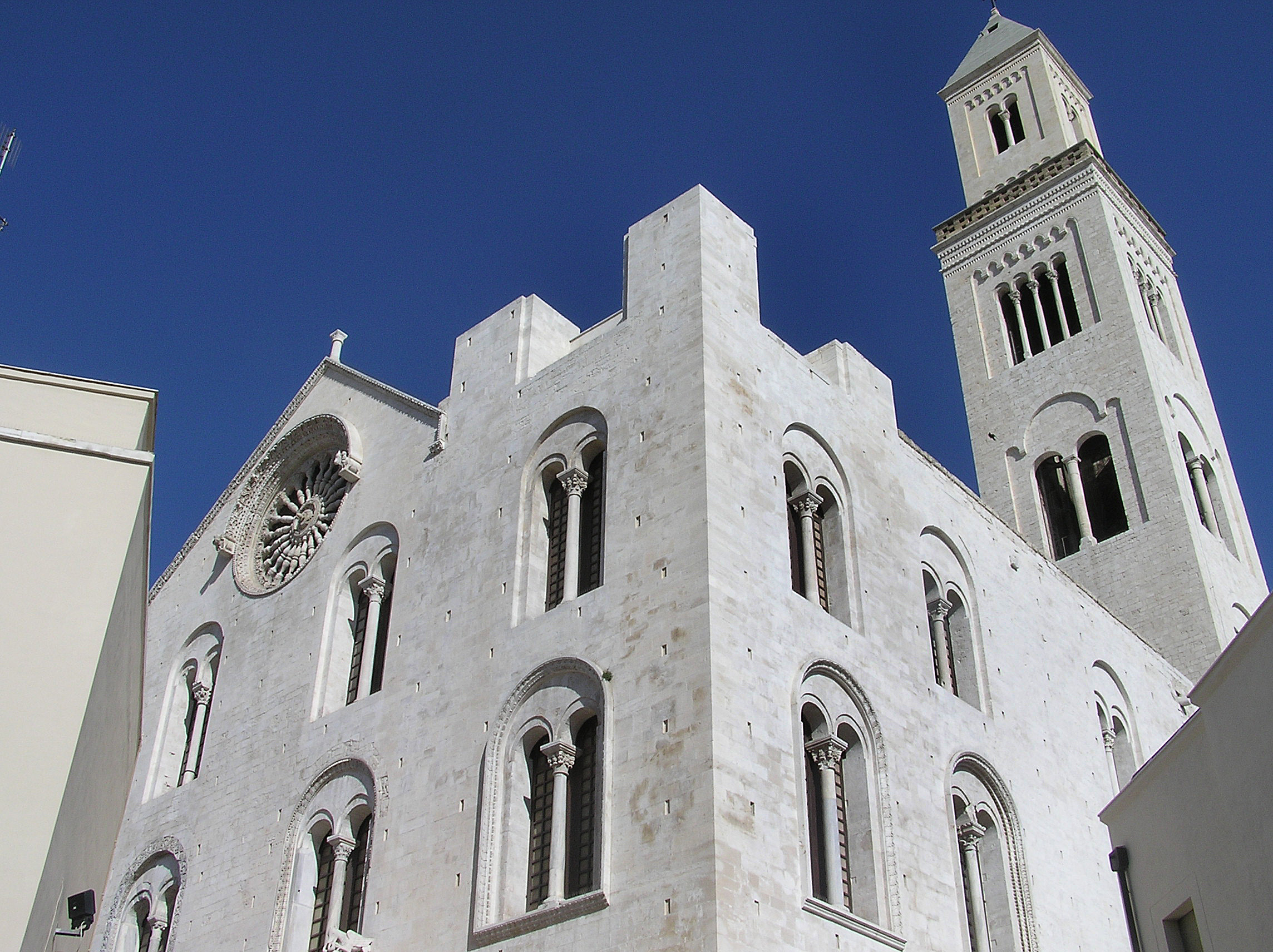 Der monumentale Ostbau im Stil der apulischen Romanik Sonstiges: Lizenzfrei